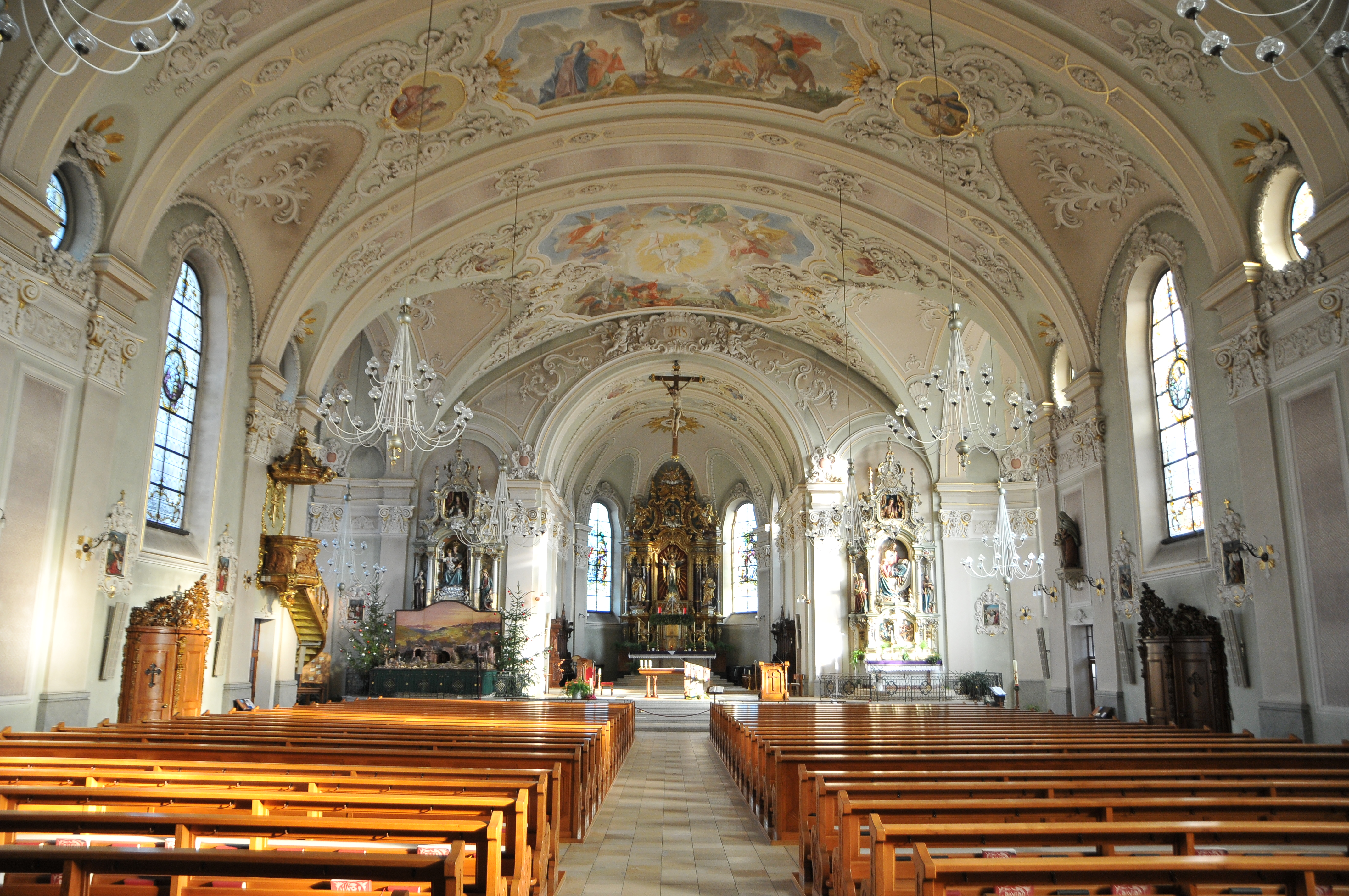 Innenaufnahmen der Pfarrkirche hl. Johannes dem Täufer., in Höchst (Vorarlberg). Im Norden Friedhof mit Arkaden. Mächtige neobarocke Kirche mit Querschiff, geschwungener Giebelfassade und schlankem Nord-Turm mit Zwiebelhaube. Heutiger Bau 1908-1910 nach Plan von Albert Rimli durch Baumeister Cornel Rhomberg.